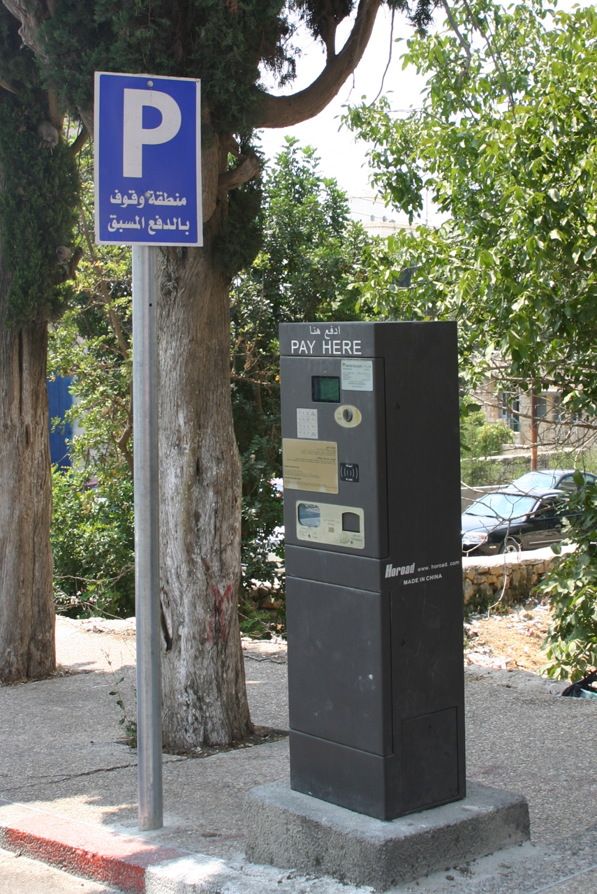 Ramallah in Palästina.